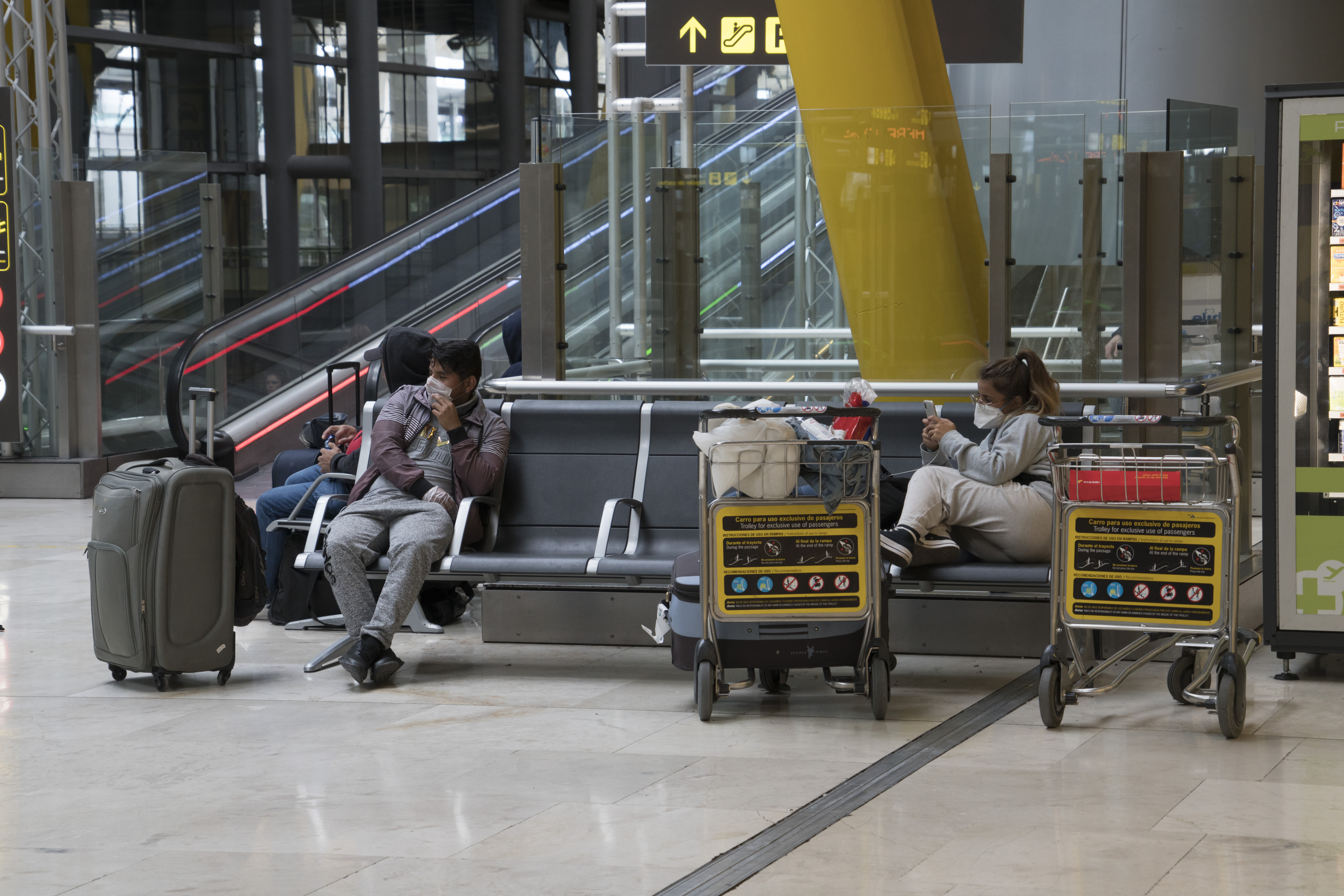 Aeropuerto Adolfo Suárez, Madrid, 24 de marzo de 2020, con la mayoría de las fronteras cerradas.